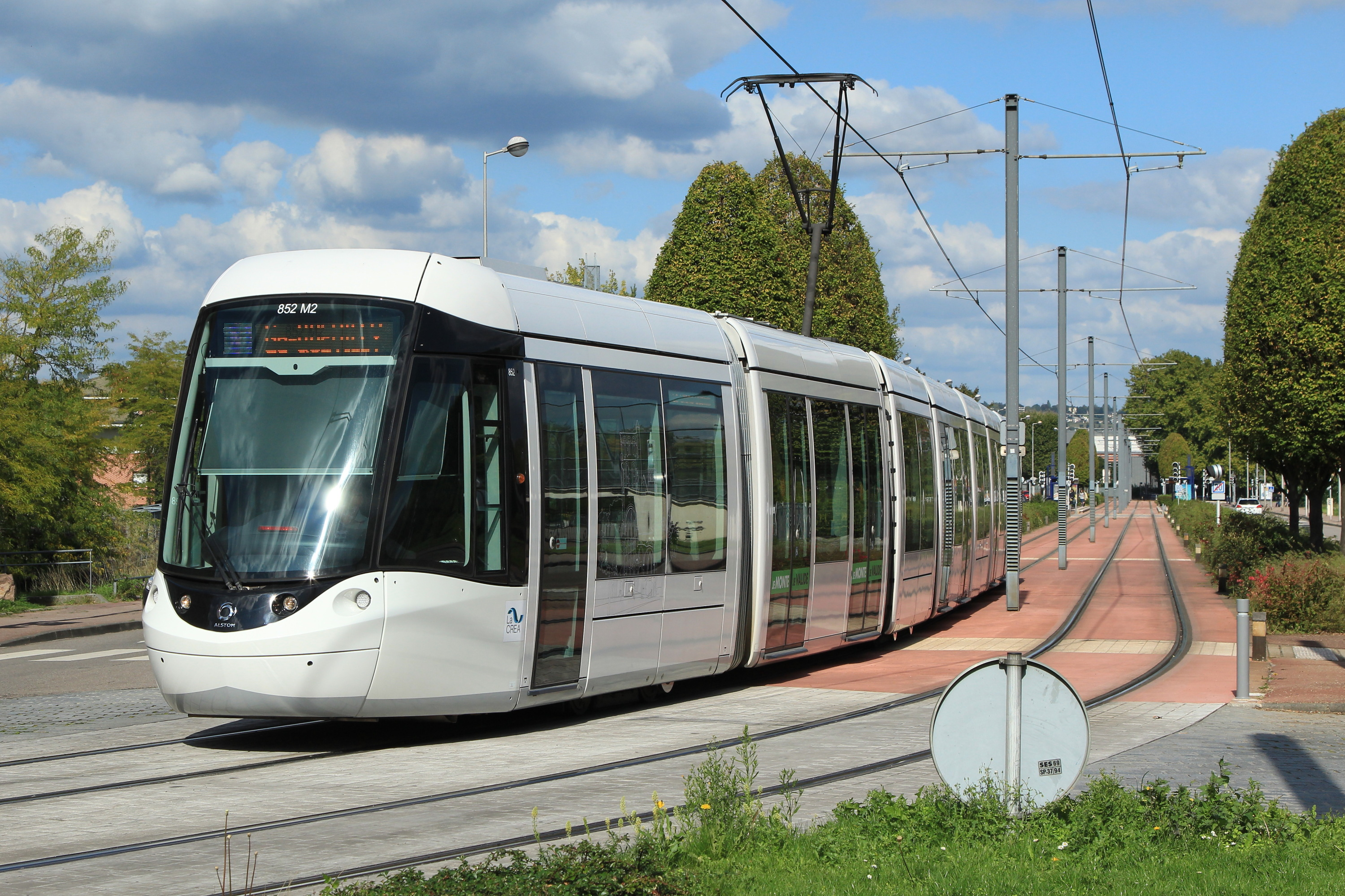 La rame Citadis n°852 du tramway (ou métro !) de Rouen entre les stations Provinces et J.-F. Kennedy quitte l'avenue des Provinces.